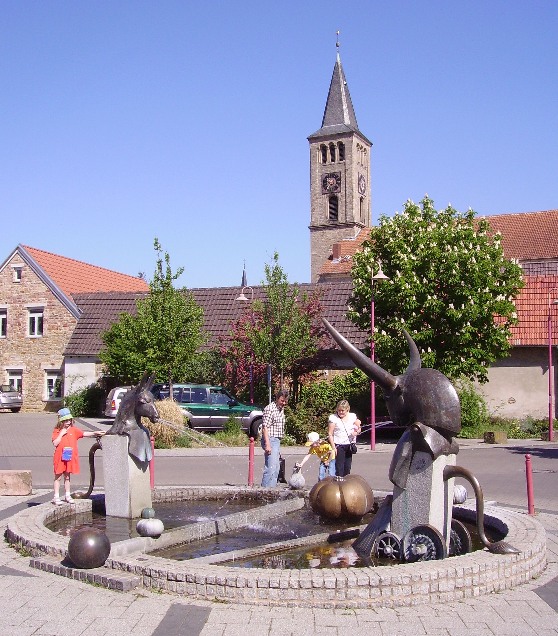 view of Dannstadt, part of Dannstadt-Schauernheim in Rhineland-Palatinate, Germany